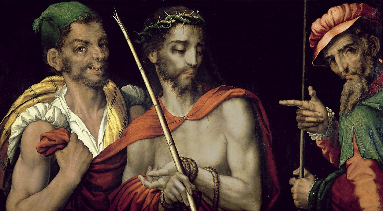 El lienzo representa a Jesucristo ante el gobernador romano Poncio Pilatos o bien entre dos sayones o verdugos.